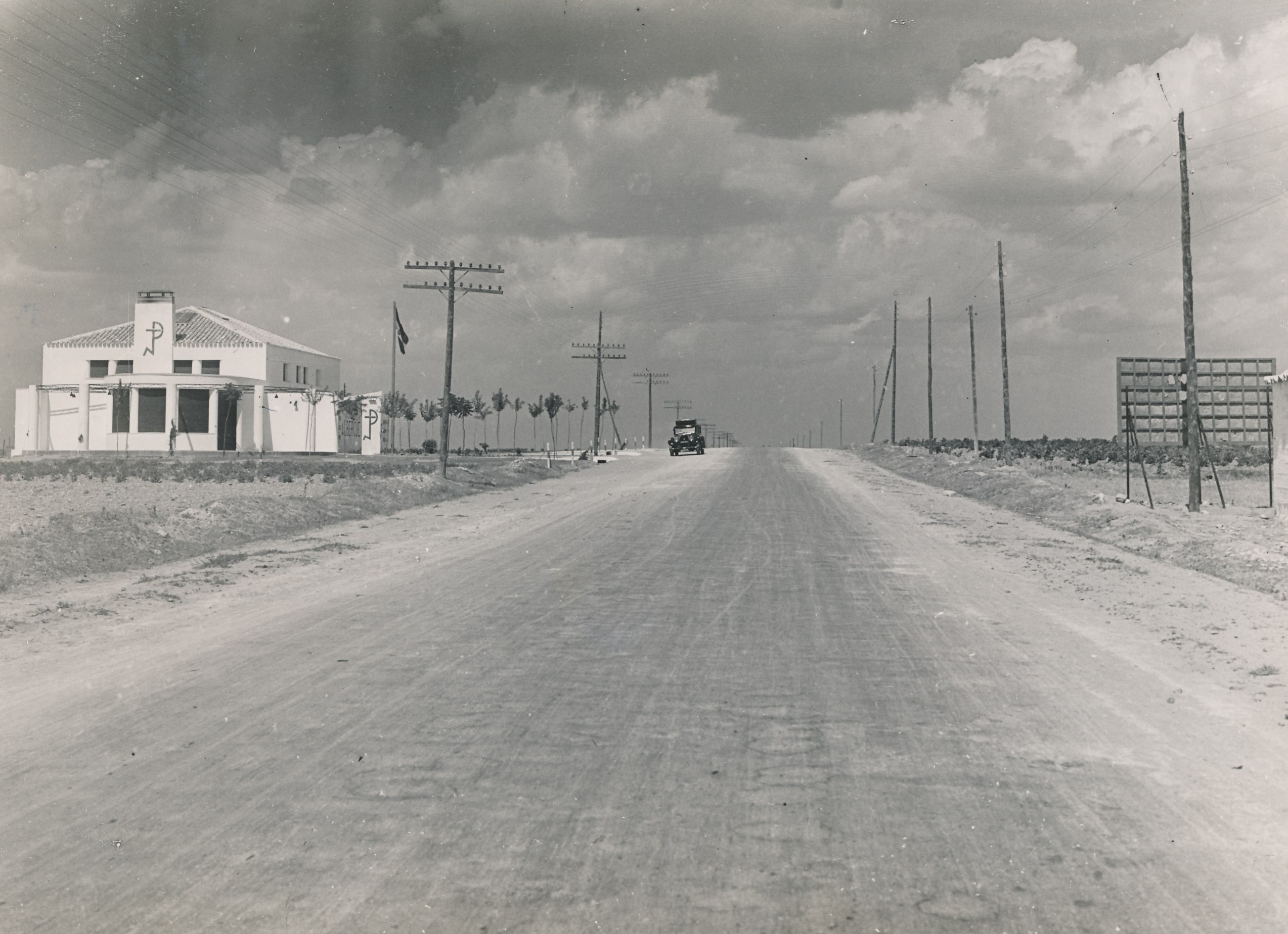 Quintanar de la Orden (Toledo) Procedencia: Archivo Fotográfico del Patronato Nacional de Turismo (II República 1931-1939) Fotógrafo: Registro nº: 00188 Signatura: Caja 2 Fondos: Biblioteca de la Facultad de Empresa y Gestión Pública (Universidad de Zaragoza) Legado: Luis Fernández Fuster / E.S. Turismo Huesca